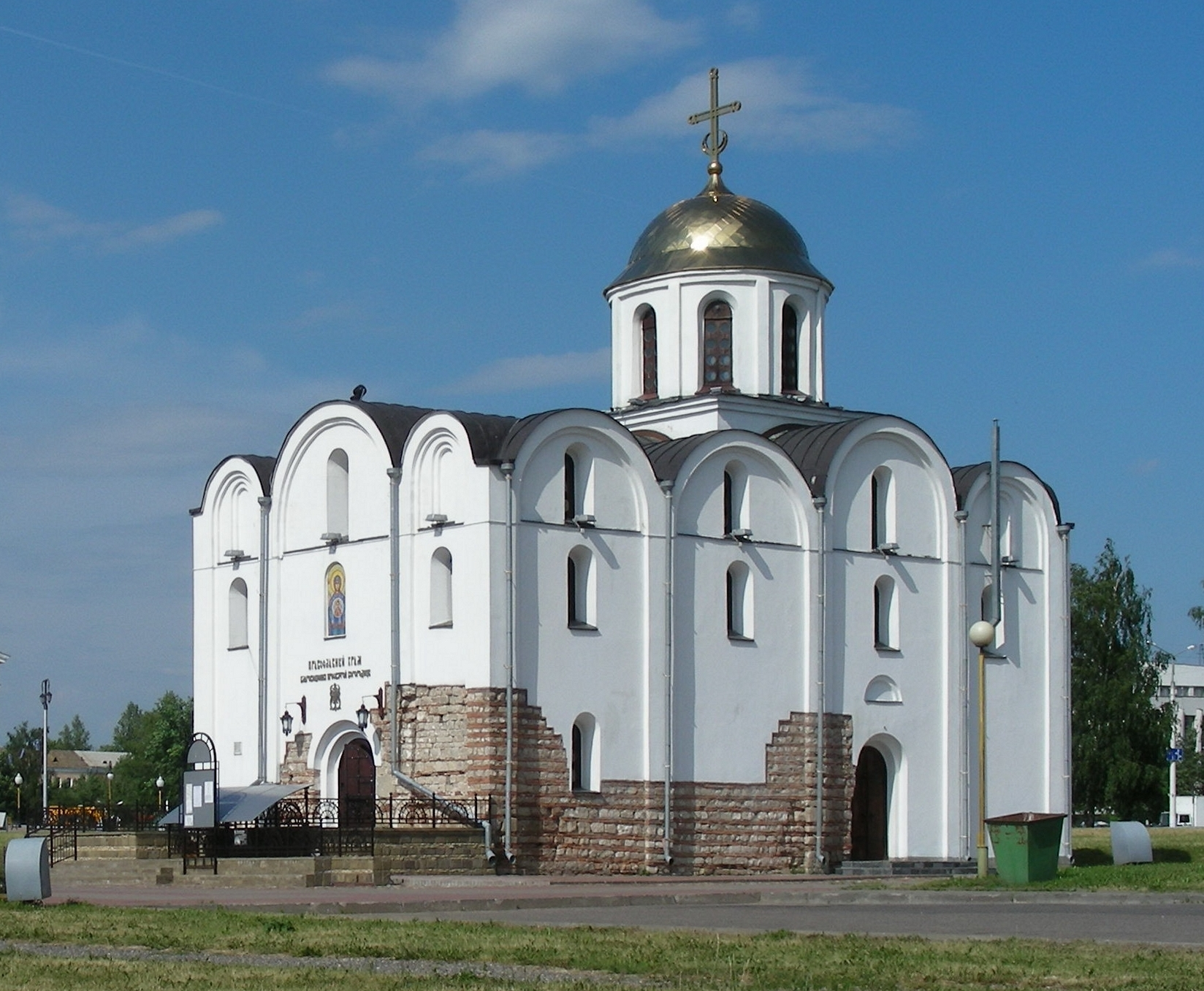 VITEBSK. Annunciation (Дабравешчанская) church (XII century).